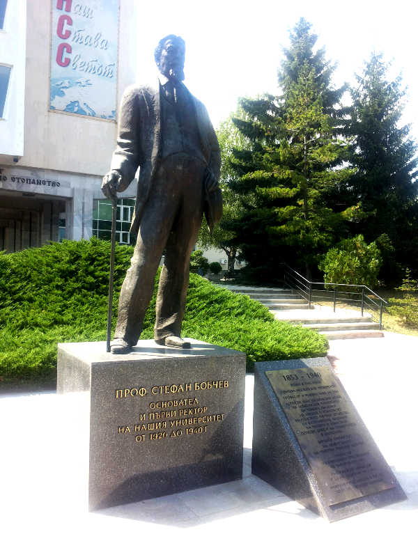 Паметник на проф. Стефан Бобчев, основател и първи ректор на УНСС